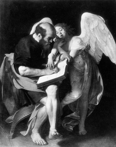 San Matteo e l'angelo Peinture du Caravage détruite en 1945